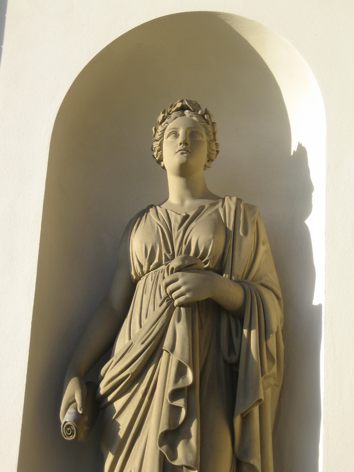 Muse Calliope am Schloss Rosenstein, Bad Cannstatt. Bildhauer Theodor Wagner ca. 1842